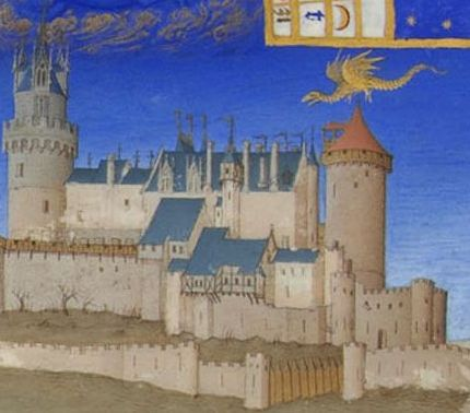 Les Très Riches Heures du duc de Berry, mois de mars, détail, Le dragon volant Mélusine est representé avec le château de Lusignan